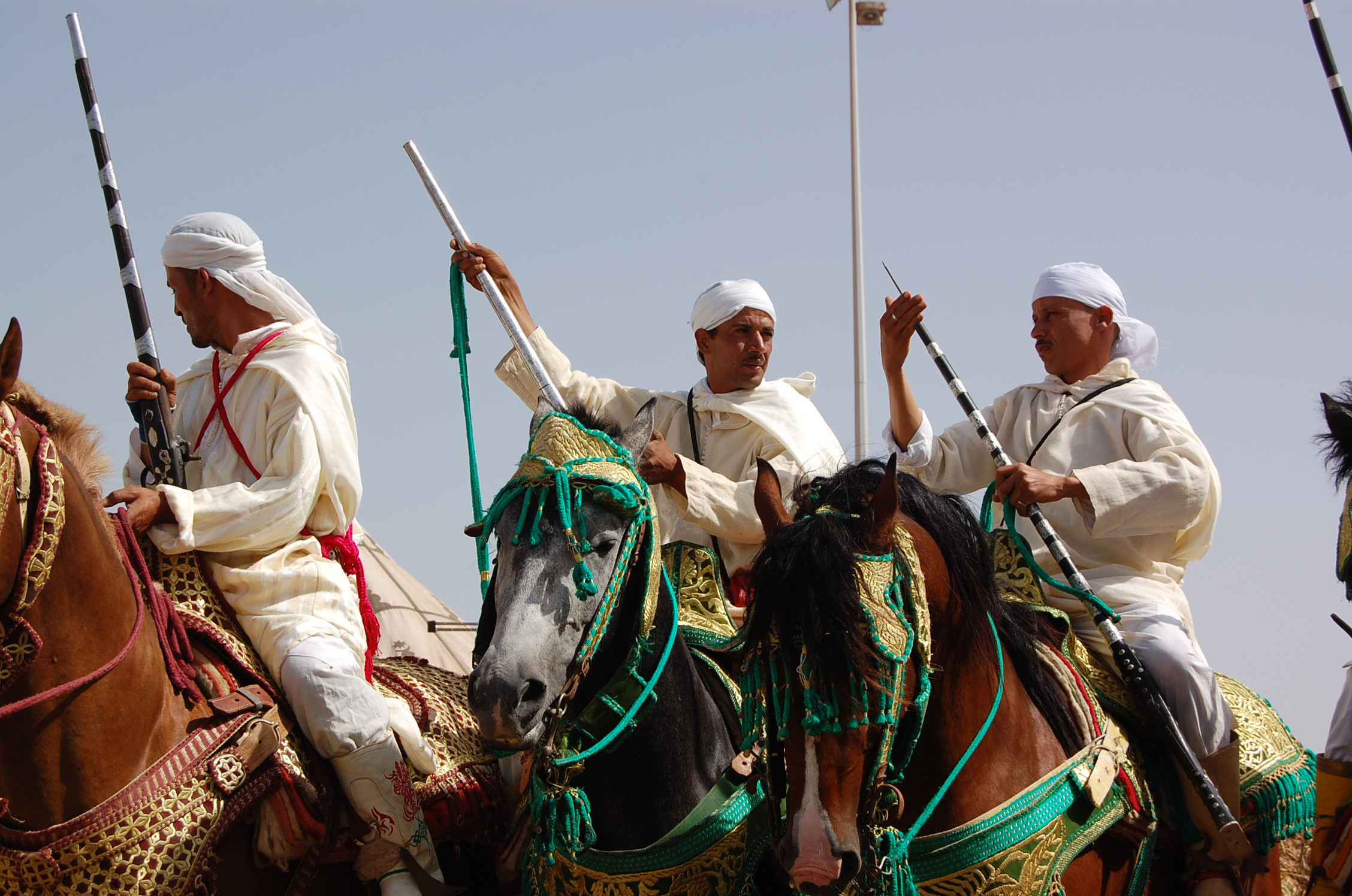 Walon: Fantazia Moulay Abdellah : tcherdjaedje del shoflete; li cavlî d' droete est ki bôre li poure avou on bôra, et mzurer li livea del poure: i fåt set, ût doets, nén dpus